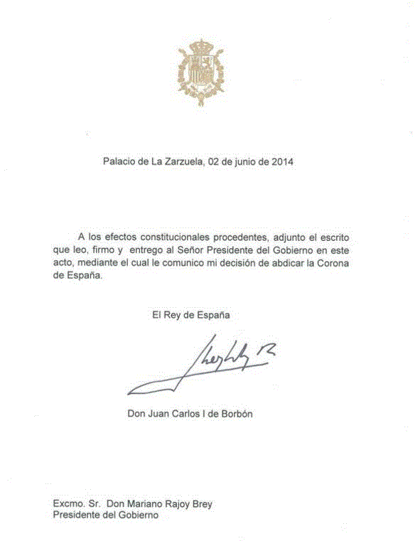 Documento oficial emitido por el Palacio de la Zarzuela